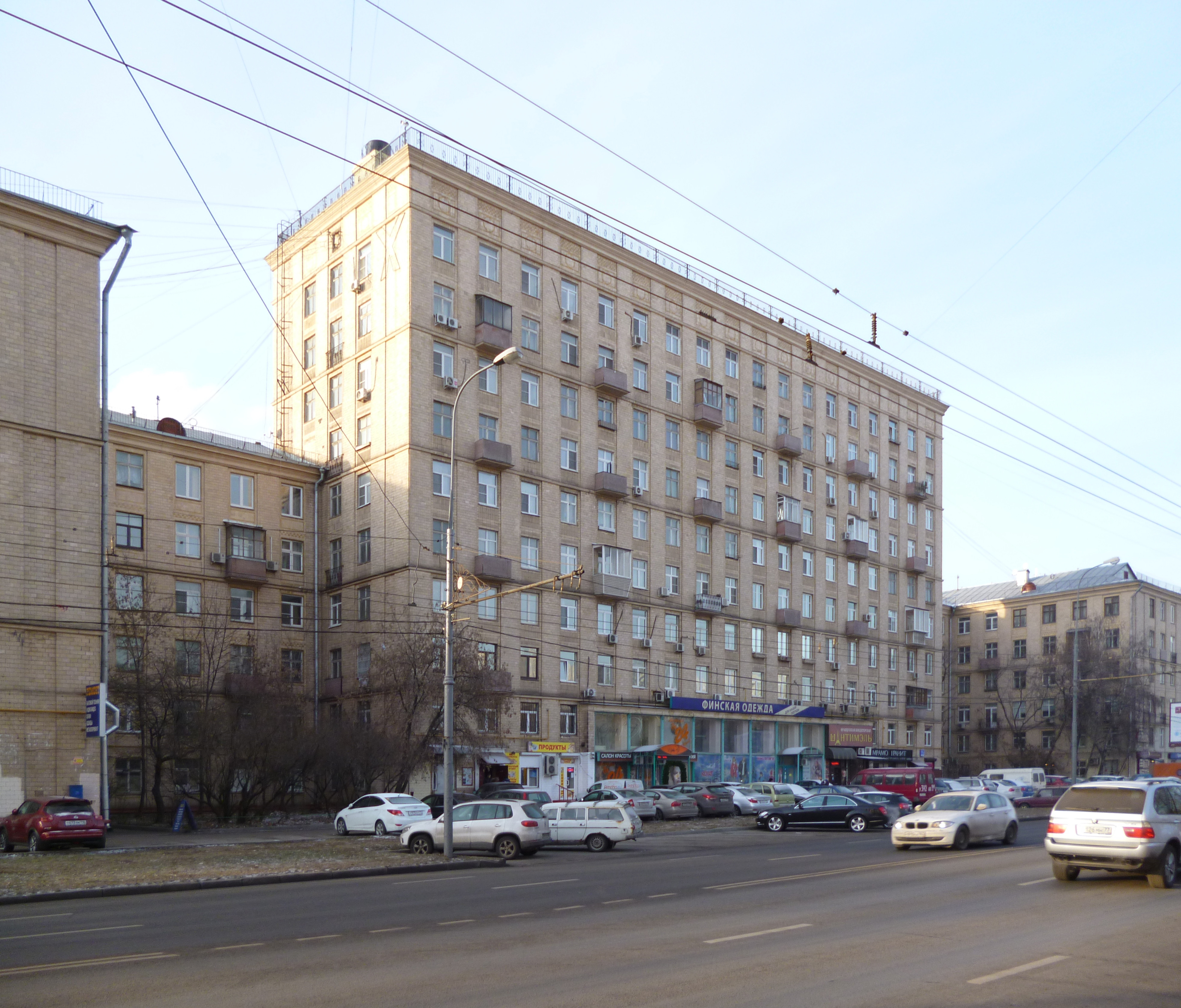 Улица Куусинена, дом 11